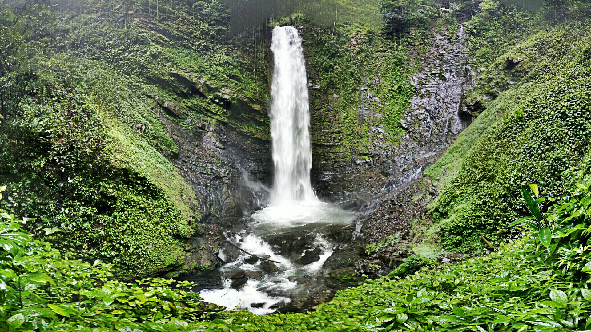 55 metros de altura